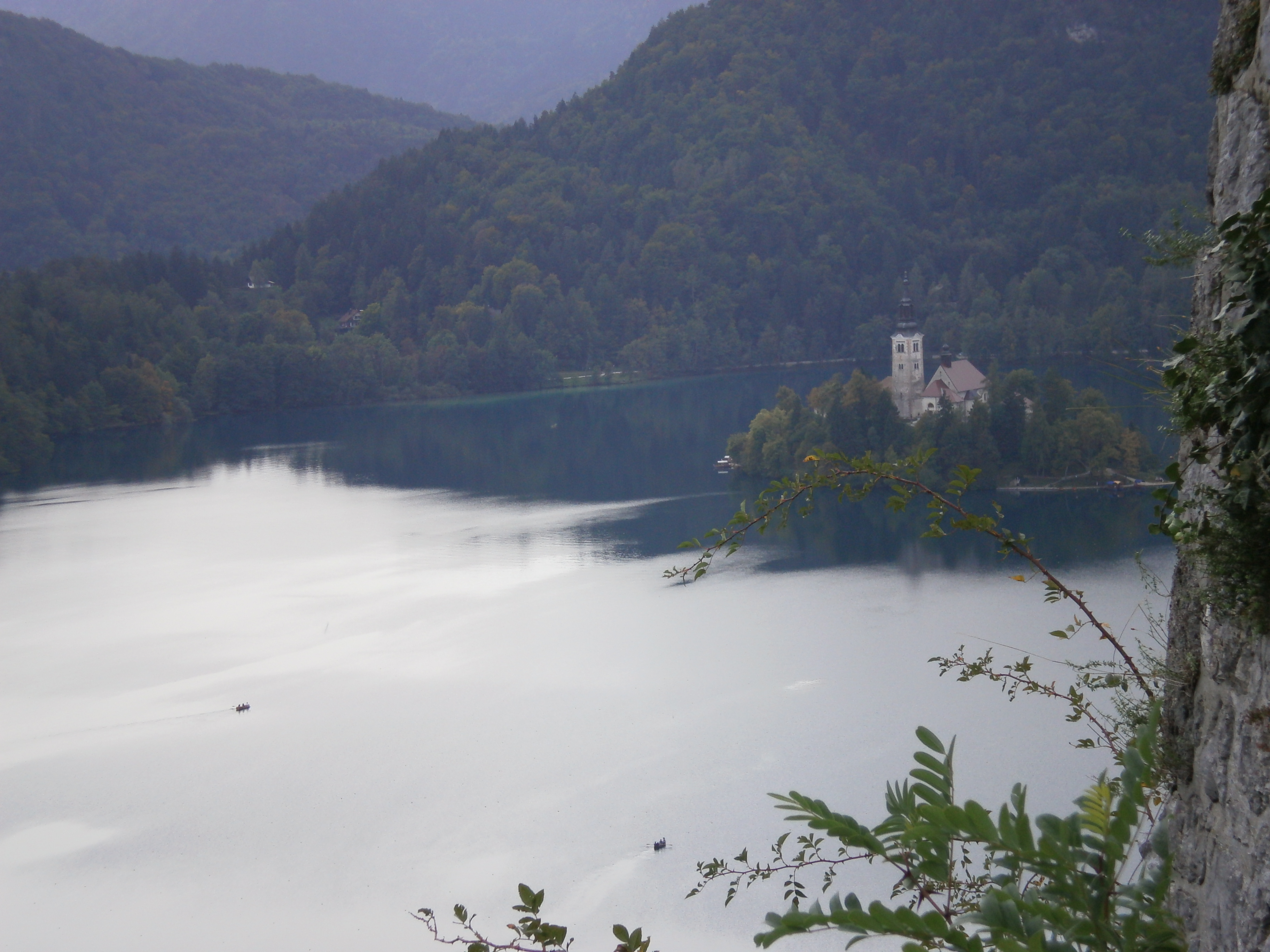 Bled látképe, Szlovénia